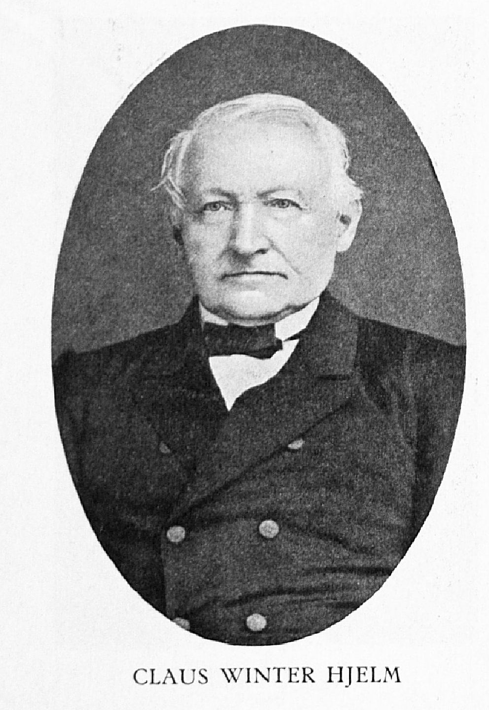 Claus Winter Hjelm 1797-1871, Professor i lovkyndighet 1834–1843.